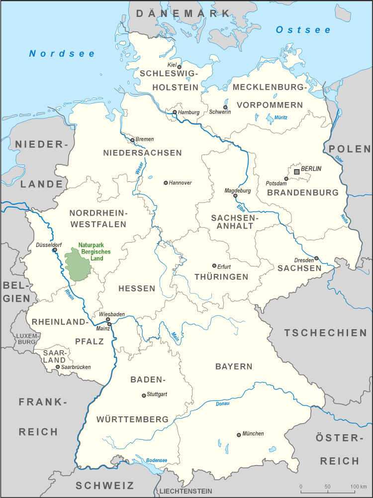 Karte des Naturparks Bergisches Land in Deutschland